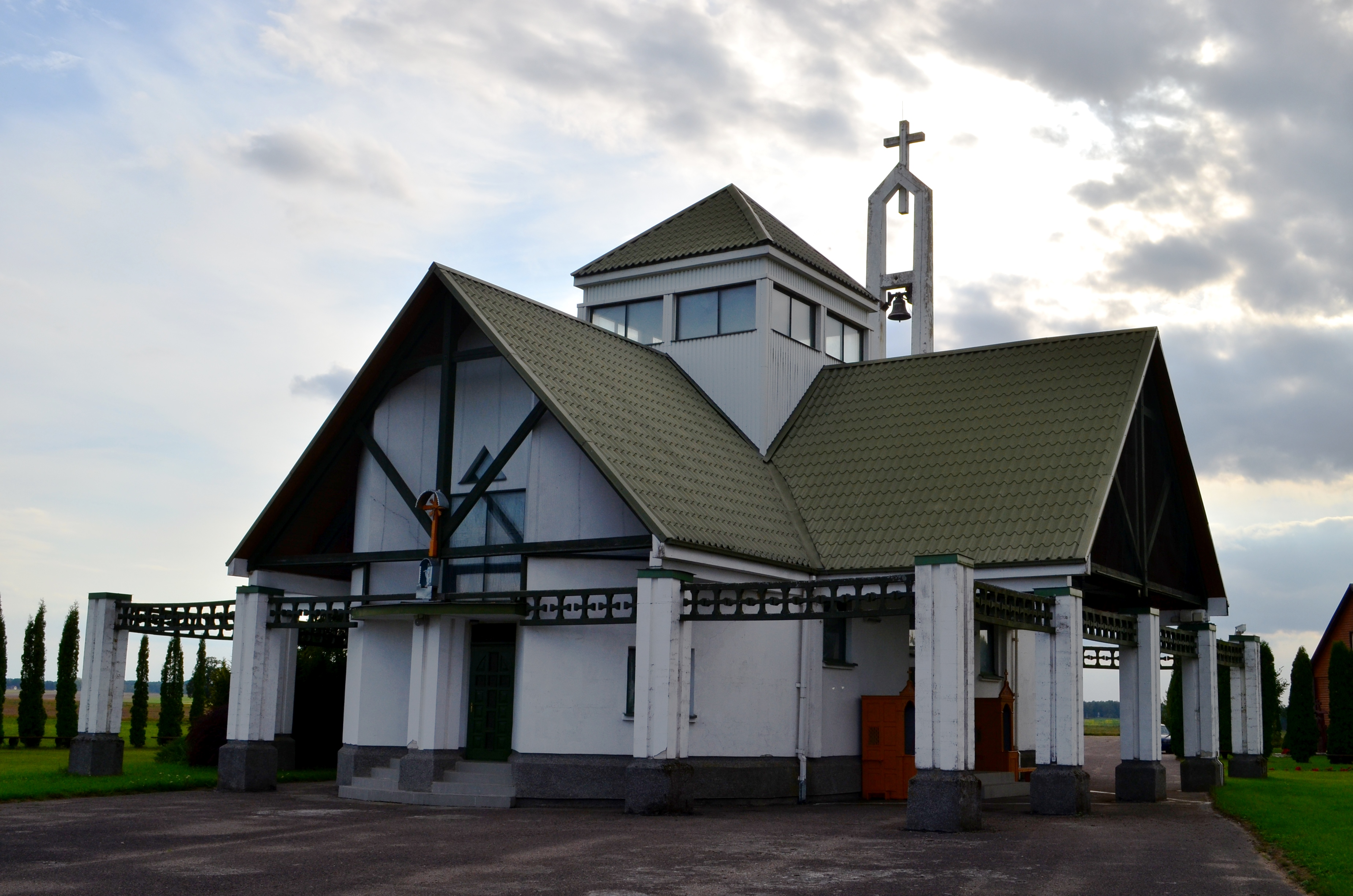 Suodžių koplyčia, Šakių raj.